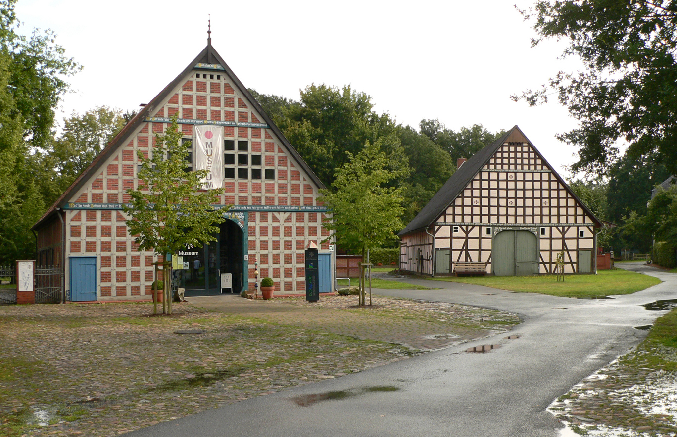 eingangsgebäude des Rundlingsmuseums Wendlandhof Lübeln, linkes Gebäude, nach hinten befinden sich weitere typische Bauten des Wendlandes, das Eingangsgebäude ist Teil des autofreien Rundlings Lübeln